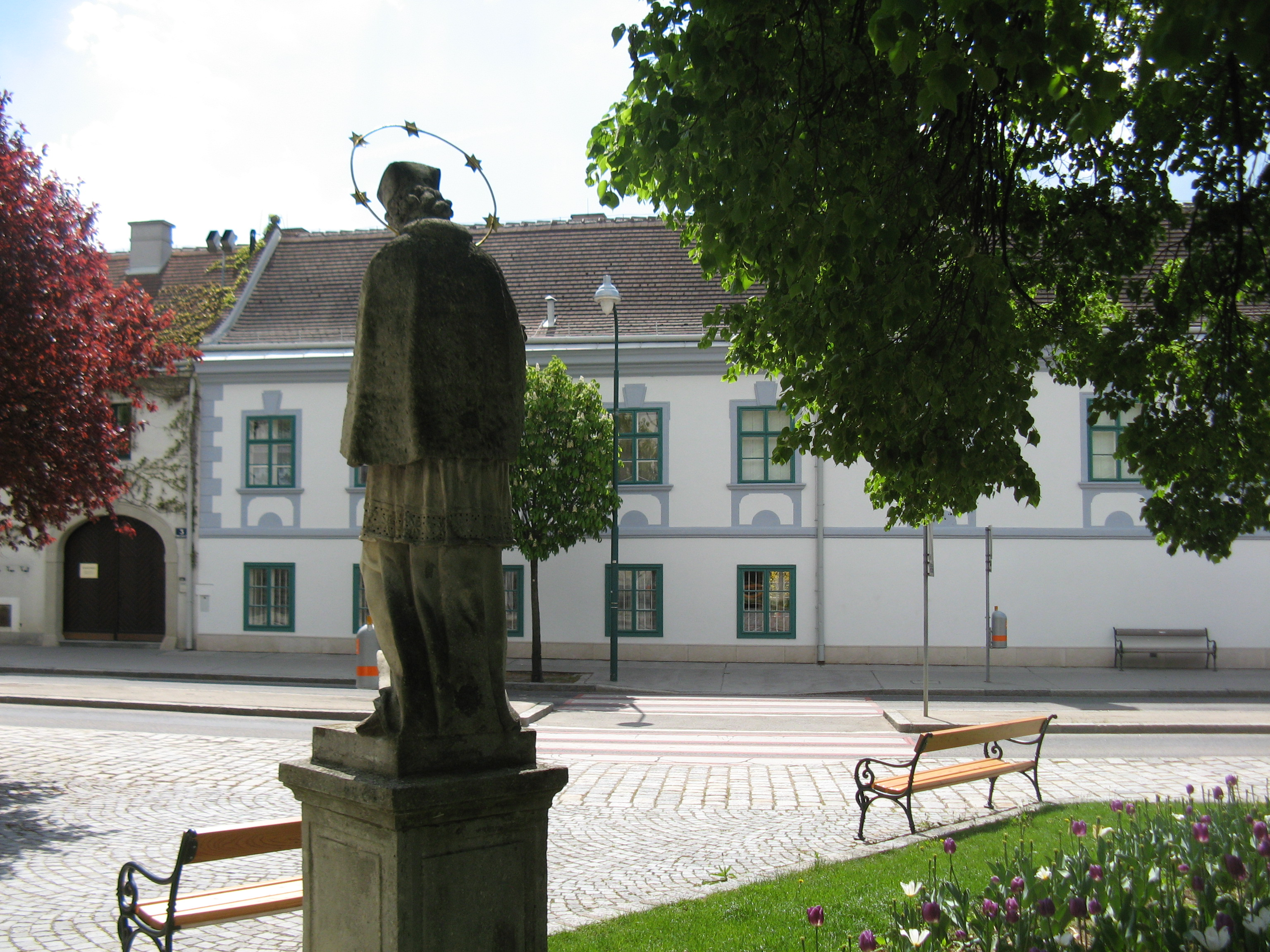 Statue des Hl. Johannes von Nepomuk und Pfarrhof, Oberlaaer Platz, Wien-Favoriten